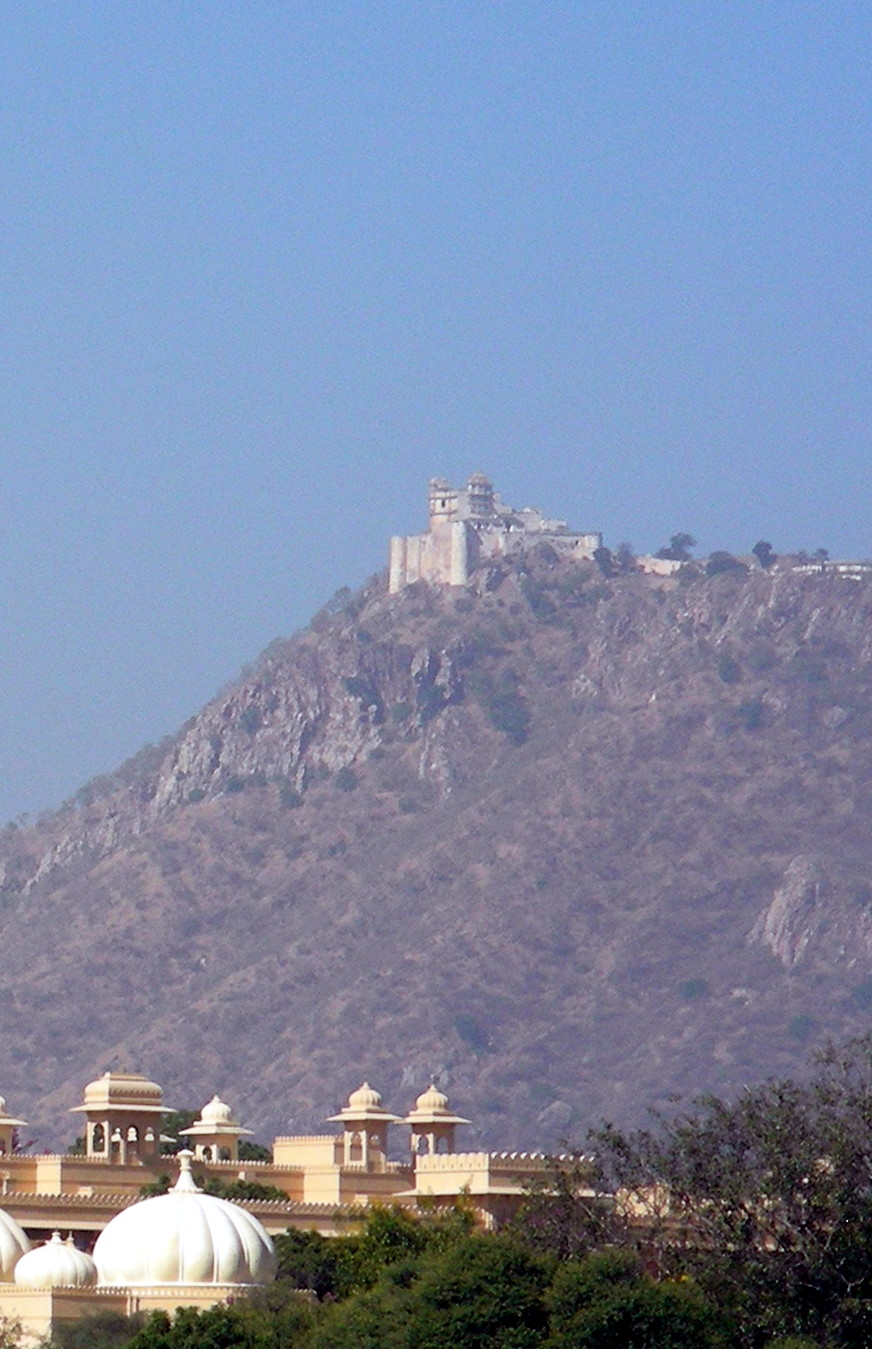 Monsoon Palace, Udaipur, India